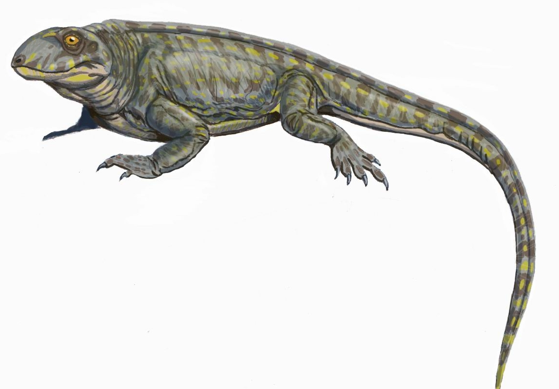 Ricostruzione di Palaeohatteria.